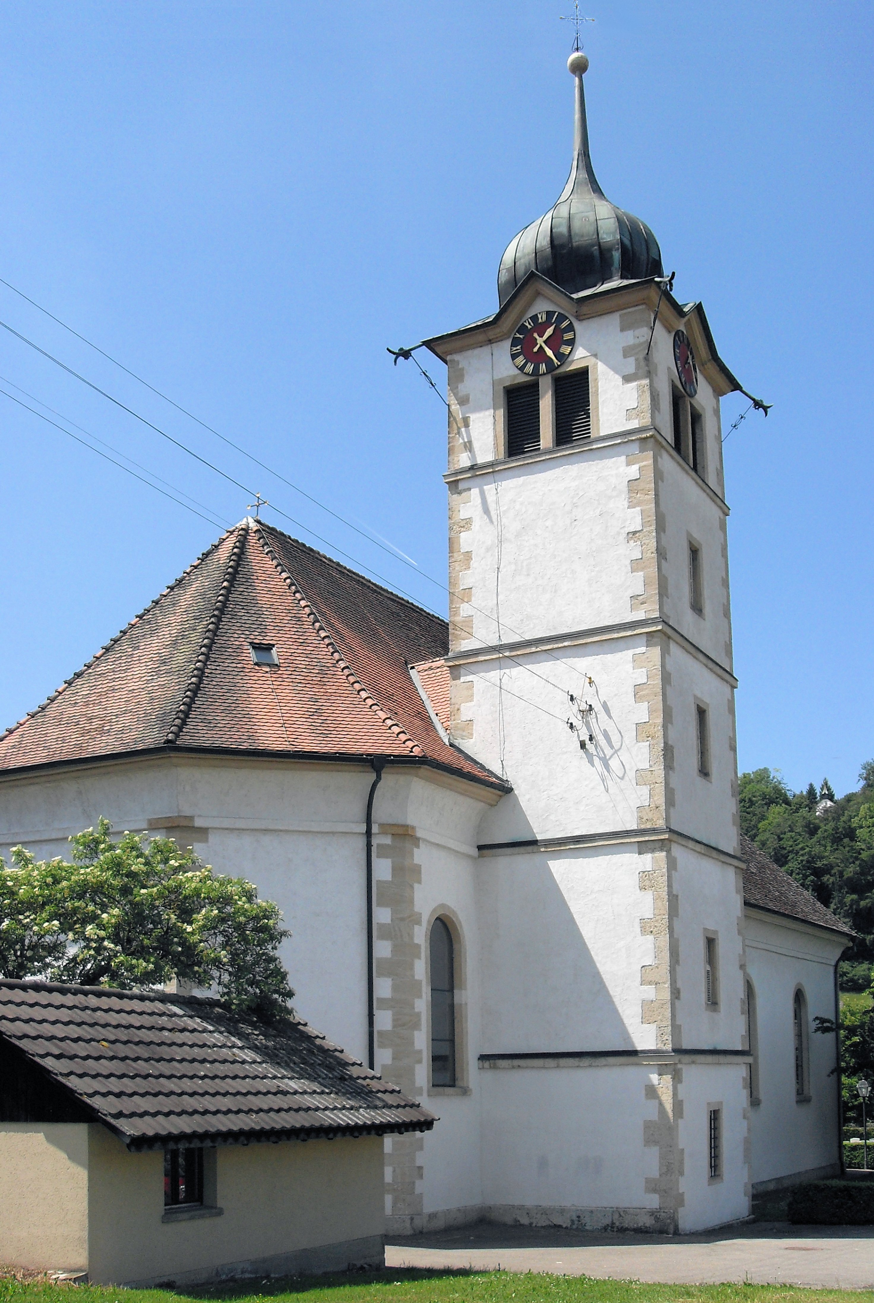 Kirche St. Gallus in Hochwald, Kanton Solothurn, Schweiz